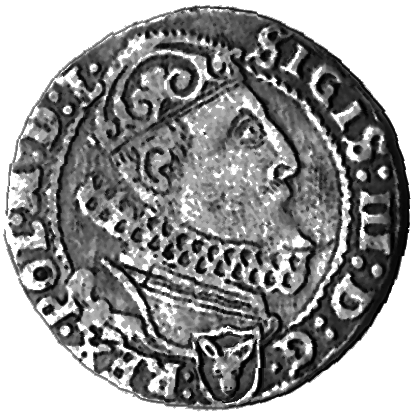 Szóstak koronny Zygmunta III Wazy z 1626 r., retuszowany skan oryginalnej monety